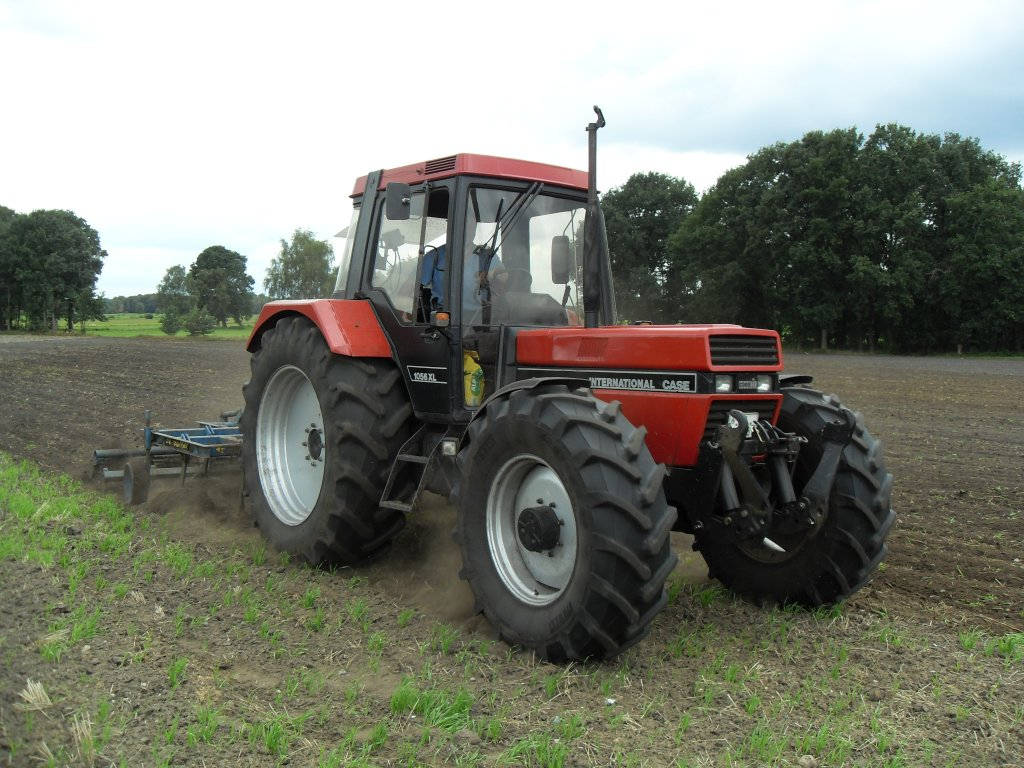 Traktor Case IH 1056 XL beim Grubbern